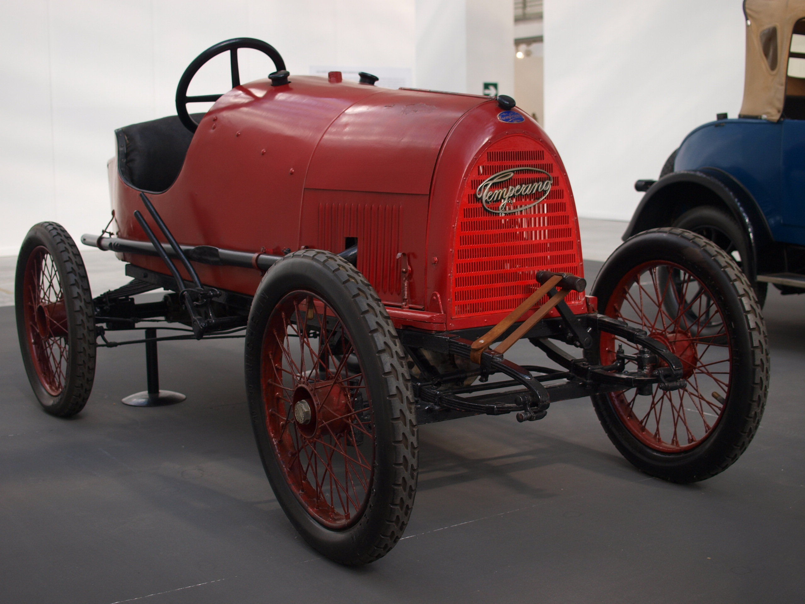 L'Evoluzione dell'automobile Temperino 8/10 HP - Italy 1920